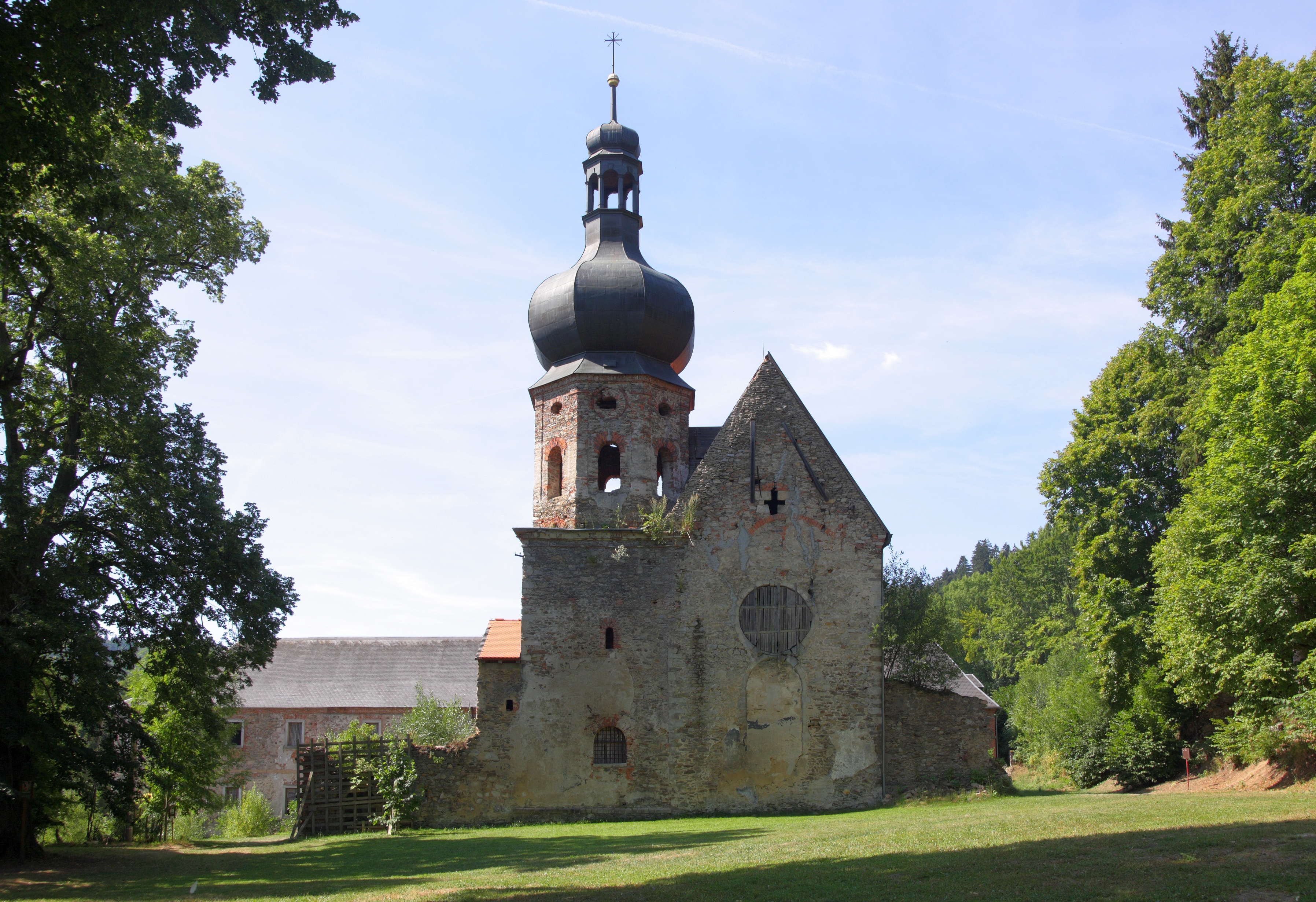 Pivoň - kostel Zvěstování Panny Marie.